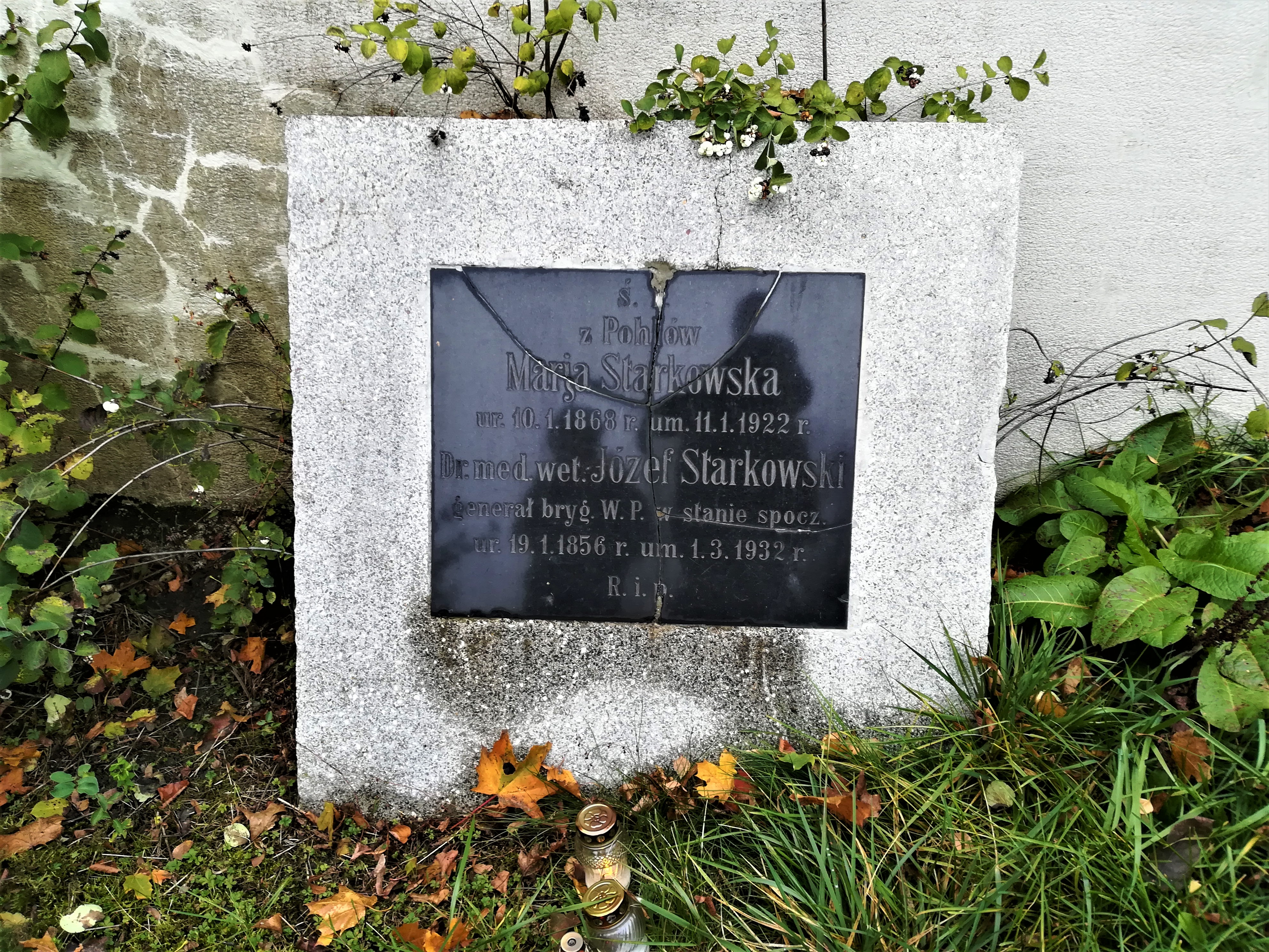 Grób gen. Józefa Starkowskiego na Cytadeli w Poznaniu.